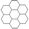 une image très simple créee par moi meme sous PS, représentant un maillage hexagonal